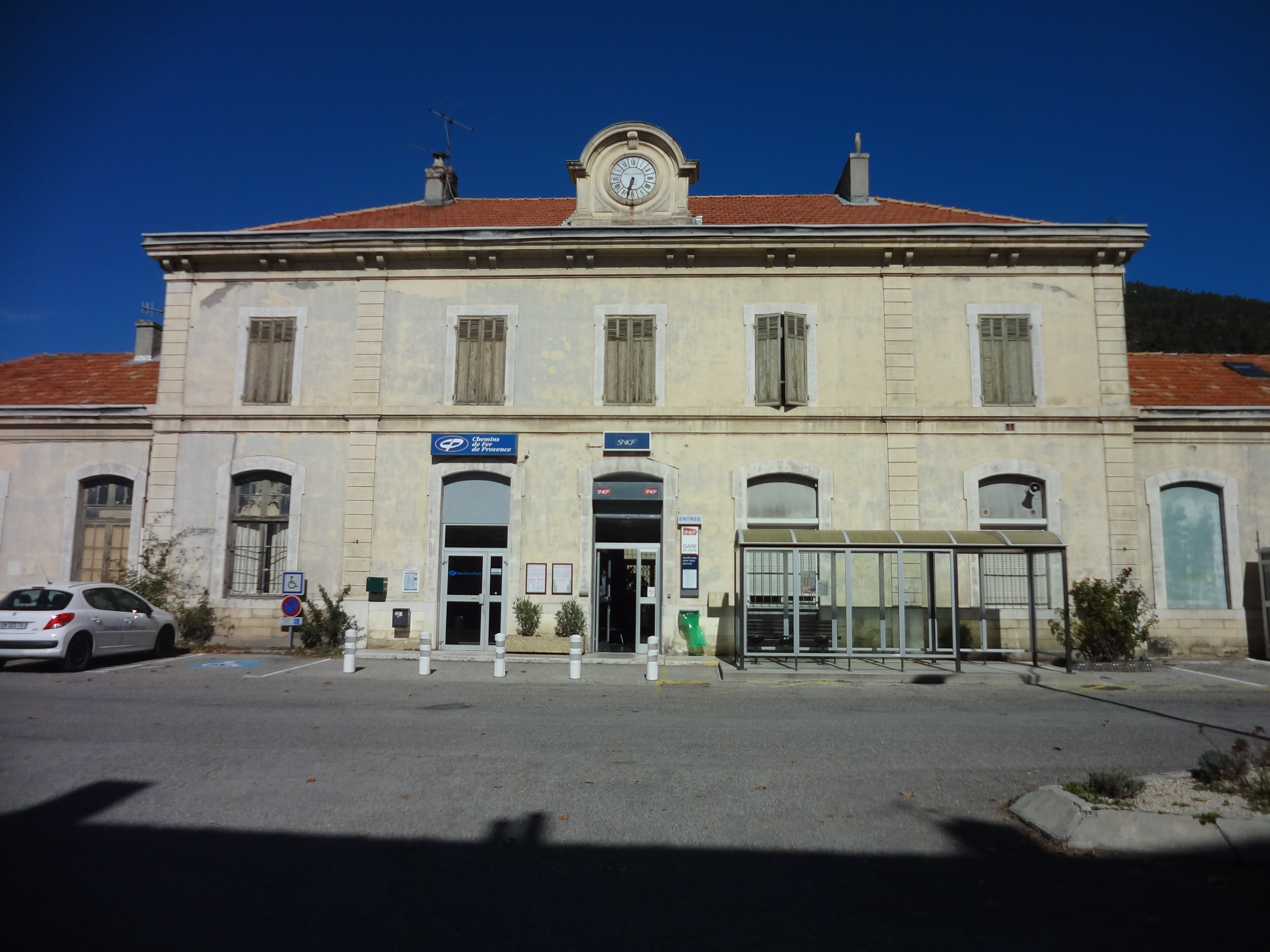 Façade de la gare SNCF de Digne (1876)